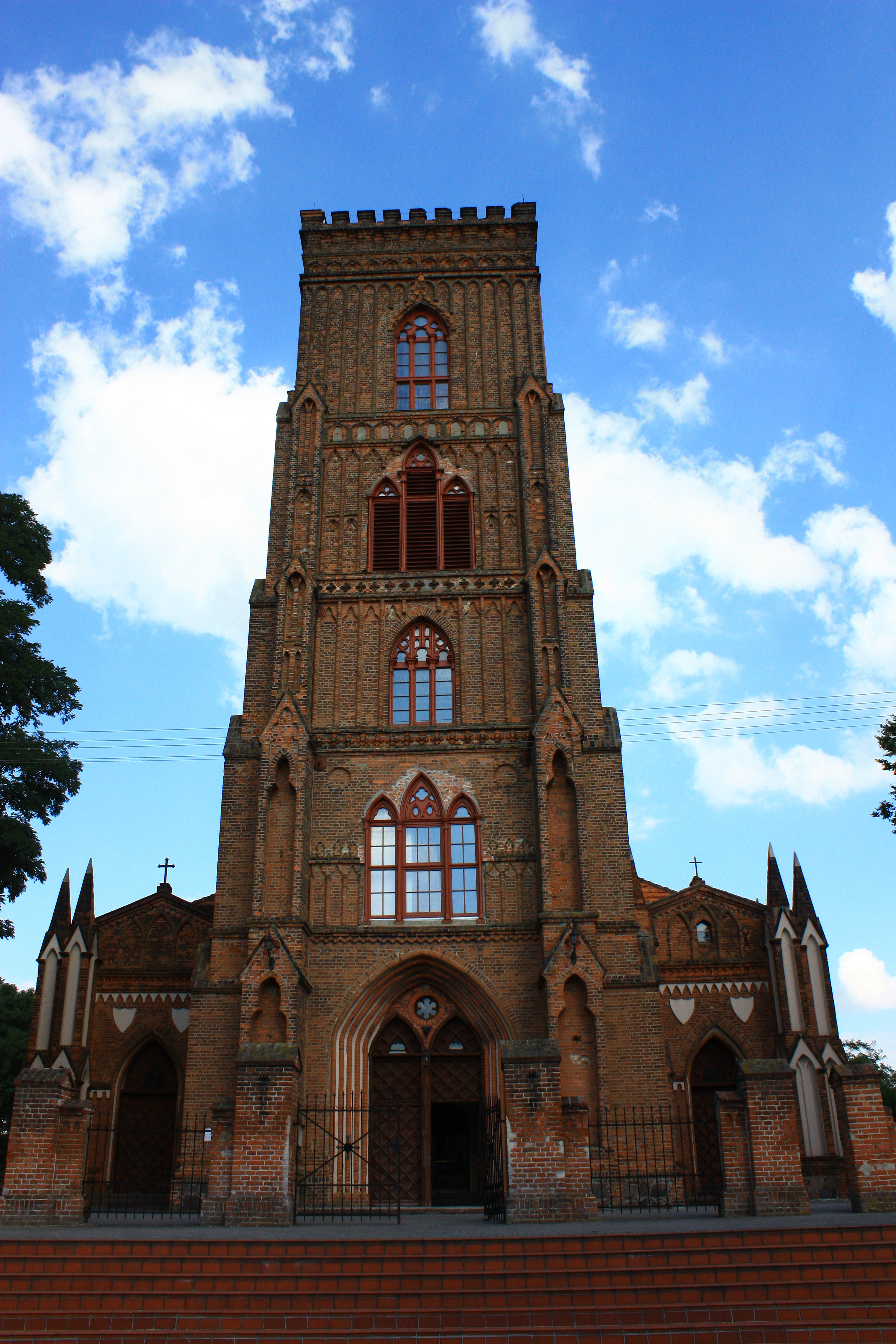 Pępowo, kościół p.w. św. Jadwigi, 1466-1625